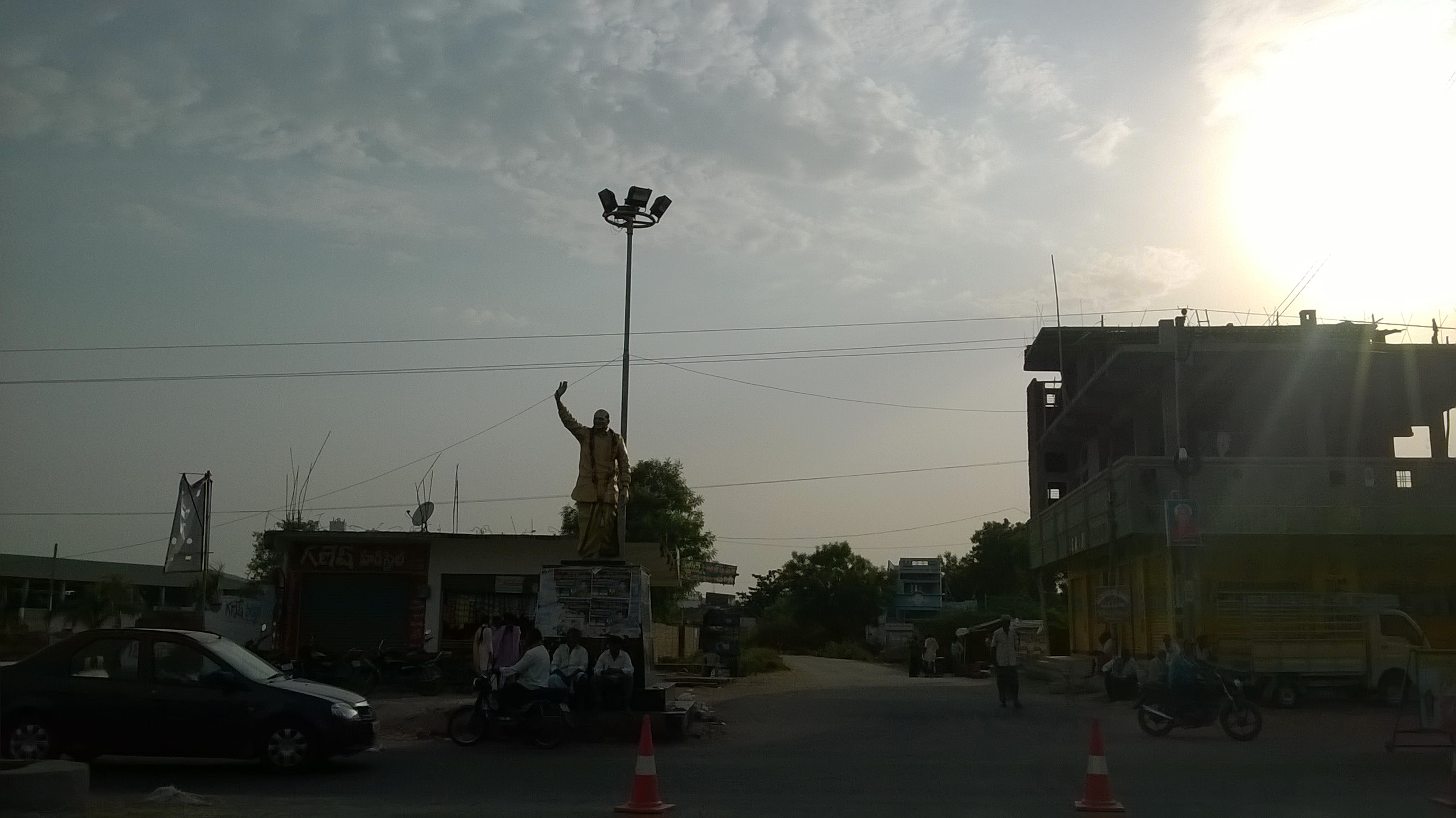 జమ్మిచేడ్ గ్రామ కూడలి